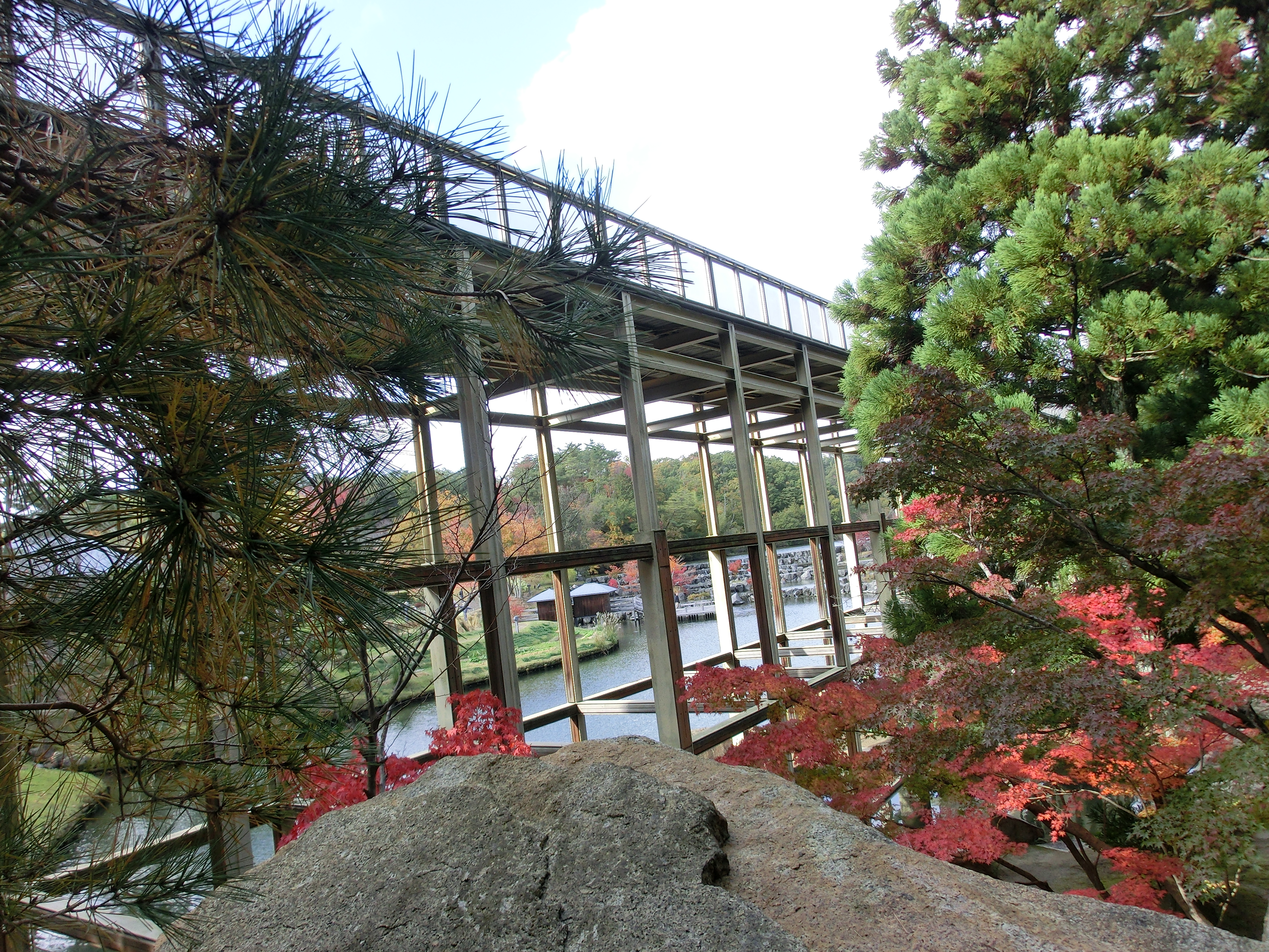 池の反対側からの写真です。